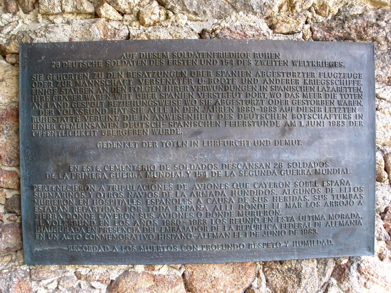 Cementerio Militar Alemán de Cuacos de Yuste (Cáceres, Extremadura, España)